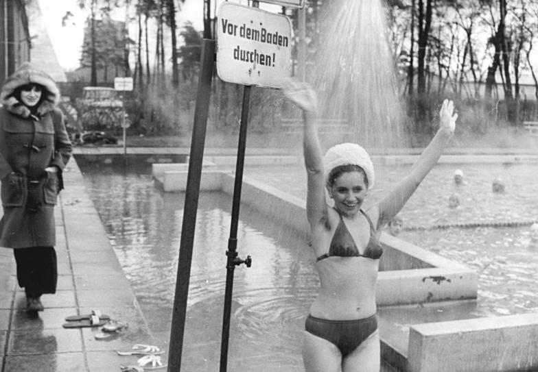 ADN-ZB Kasper 1.1.81 Bez. Cottbus- Neujahrsschwimmen- Bei einer Lufttemperatur von 4 Grad C starteten am 1. Januar rund 100 Unentwegte zum Neujahrsschwimmen im Freibad Trattendorf. Das Wasser des Schwimmbeckens wird mit Dampf aus dem nahen Kraftwerk auf 29 Grad C erwärmt.